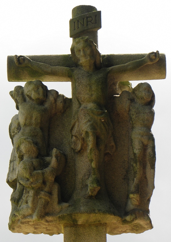 Face septentrionale du calvaire de l'ancien cimetière de Langonnet (56): le Christ en Croix, les deux larrons et Longin.